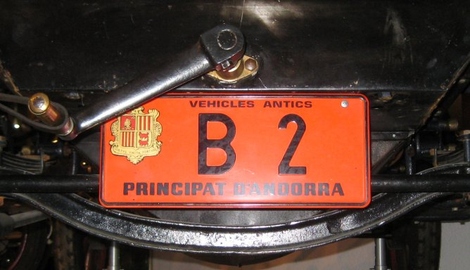 Oldtimer-Nummernschild Andorra (fotografiert im Automobilmuseum Encamp)